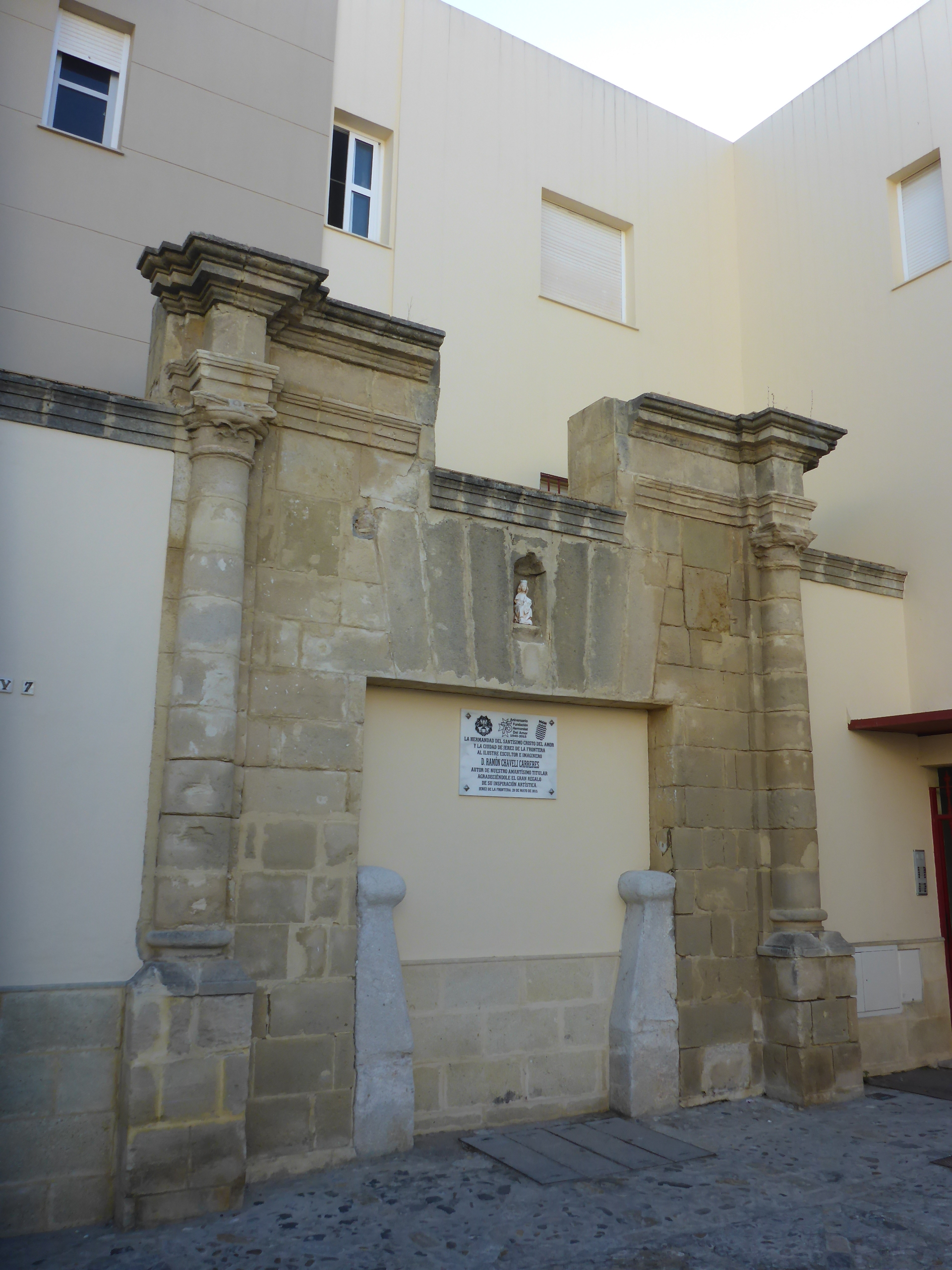 Palacio de Mirabal, Jerez de la Frontera